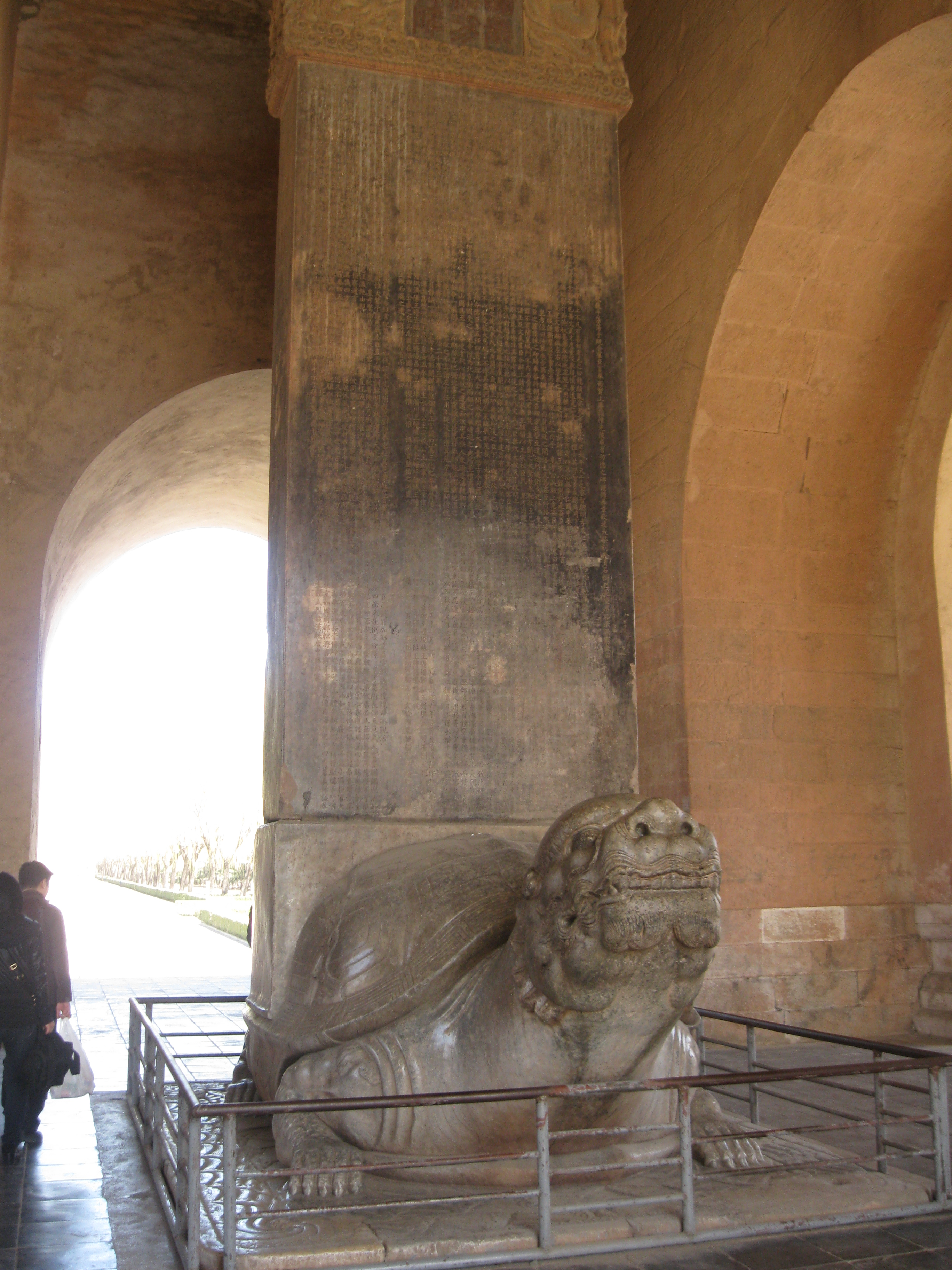 היכל אסטלת אבן - קברי שושלת מינג - האסטלה של הסגולה השמימית ומידת החוכמה של צ'אנגלינג של המינג הגדול